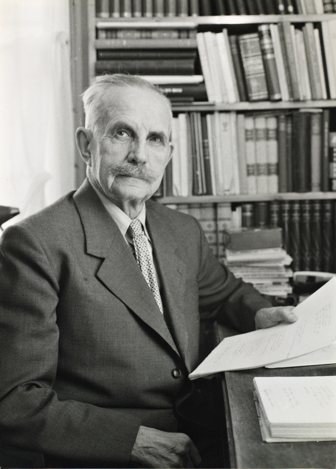 Tittel / Title: Portret av Kristofer Uppdal (1878-1961) Motiv / Motif: Postkort. Bildesignatur / Image Number: blds_00968